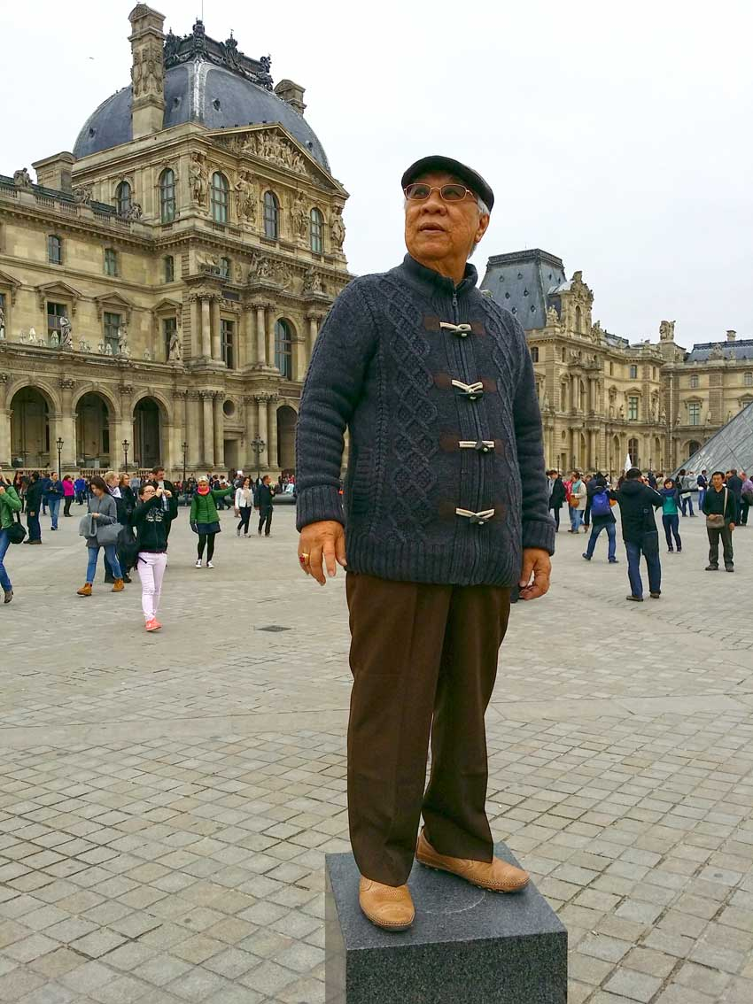 Sidik W. Martowidjojo di Prancis